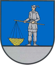 Herb miasta Chodorów